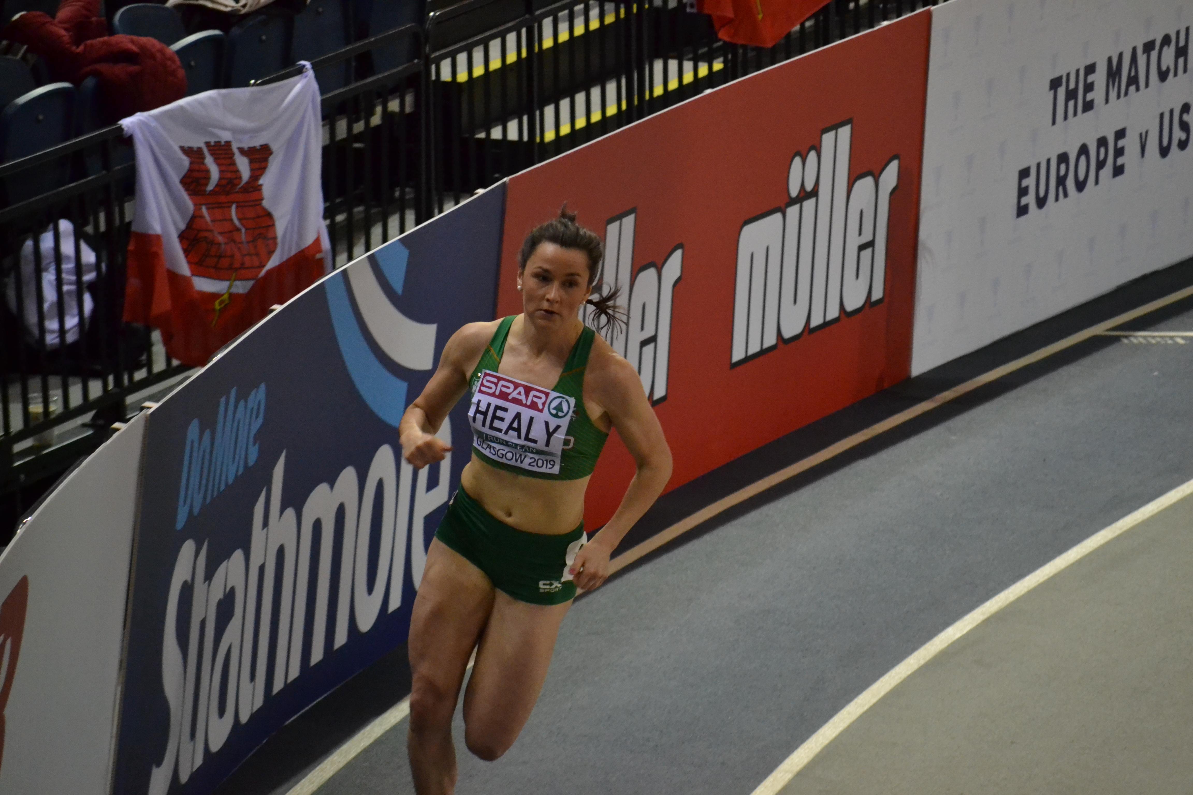 Womens 400m